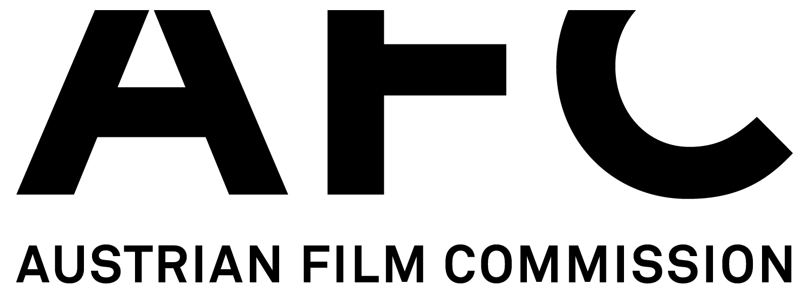 Logo der Organisation